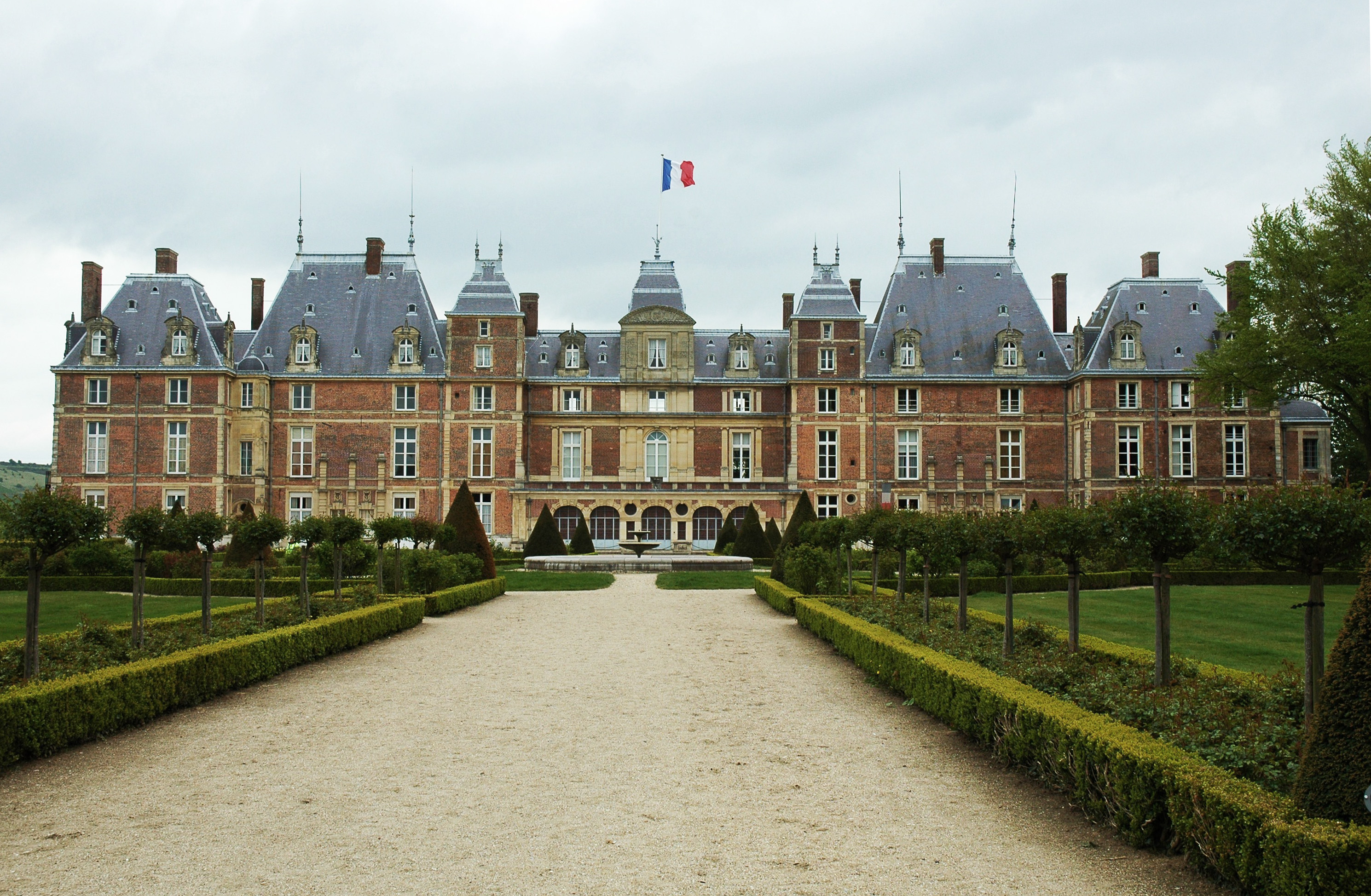 Le château d'Eu, Seine-Maritime, France